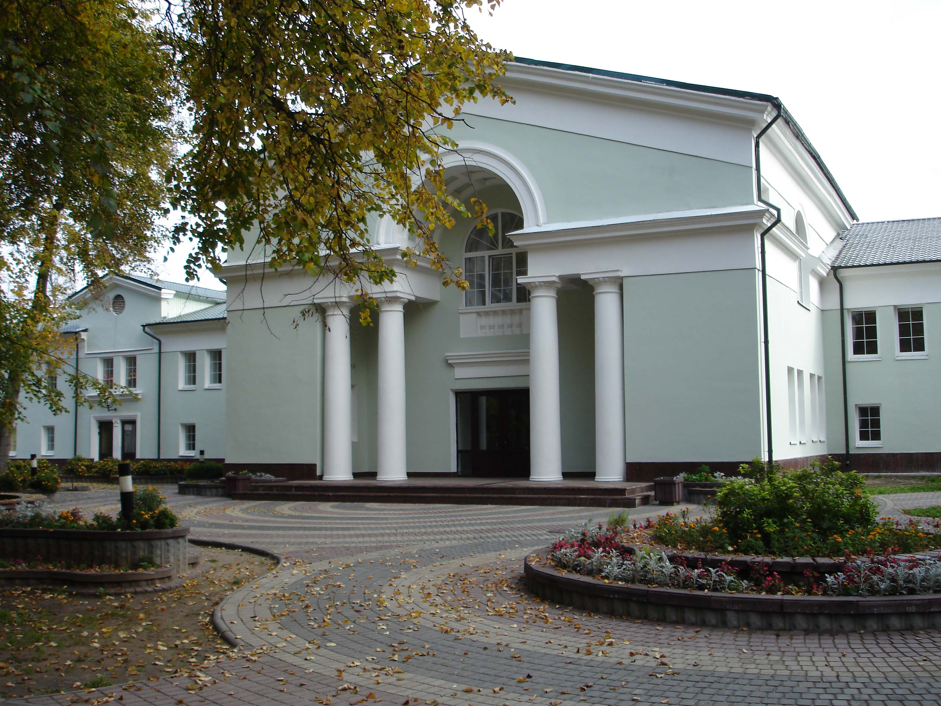 Серпуховский дворец бракосочетаний